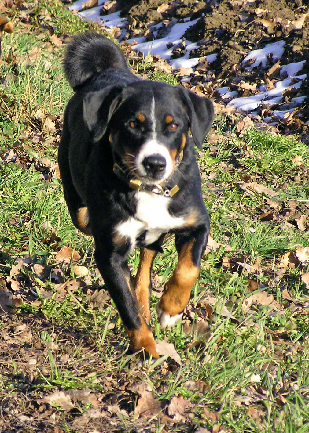 Appenzeller Sennenhund